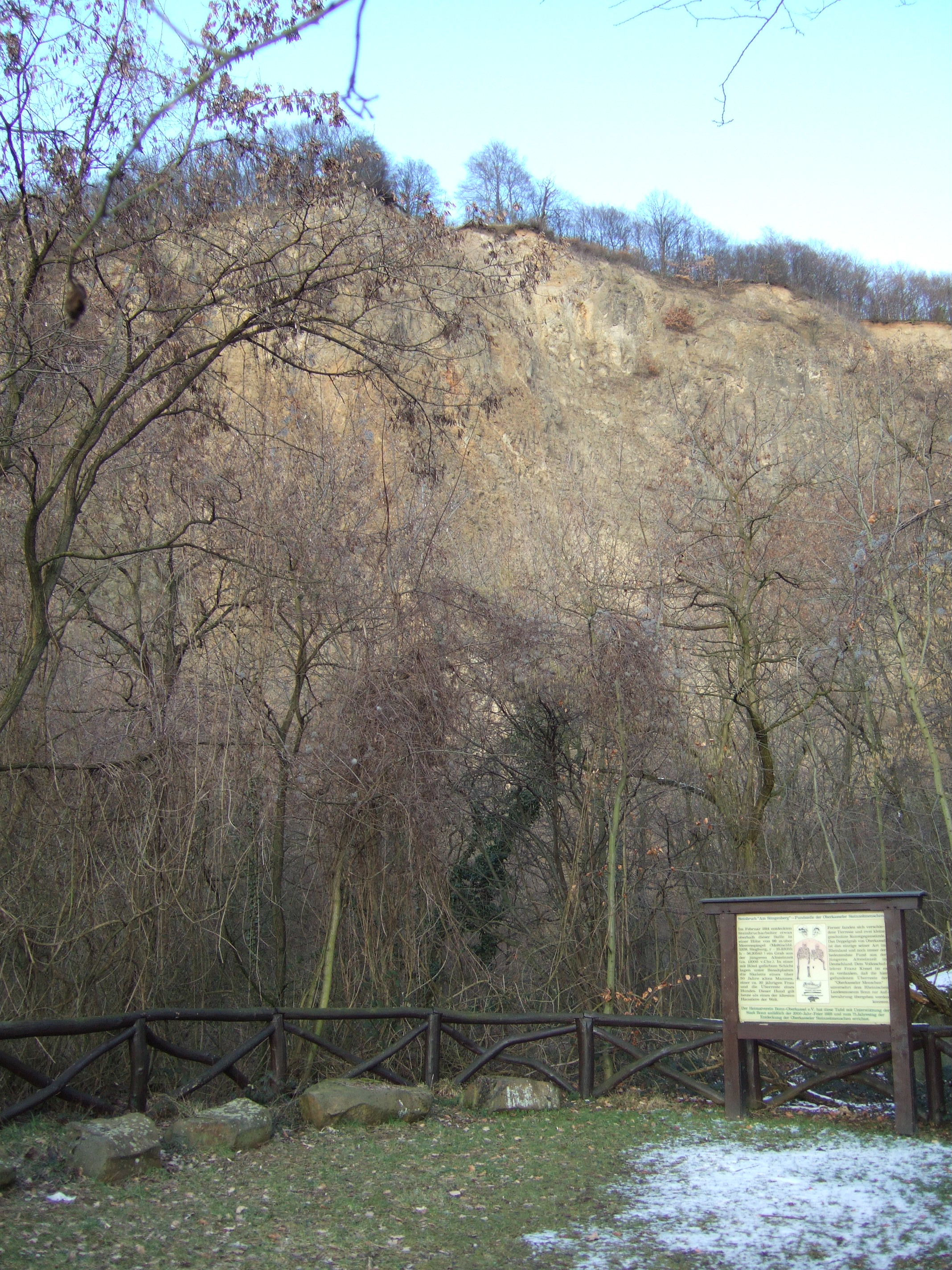 Panel